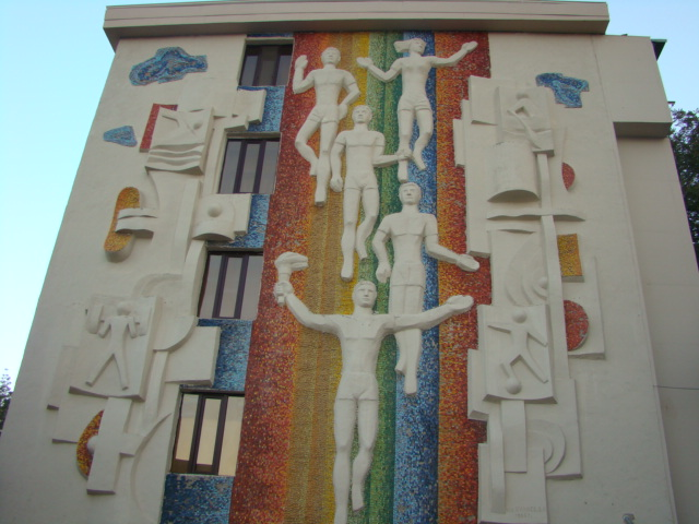 Yasamal rayonunda Həsən bəy Zərdabi prospektində bina